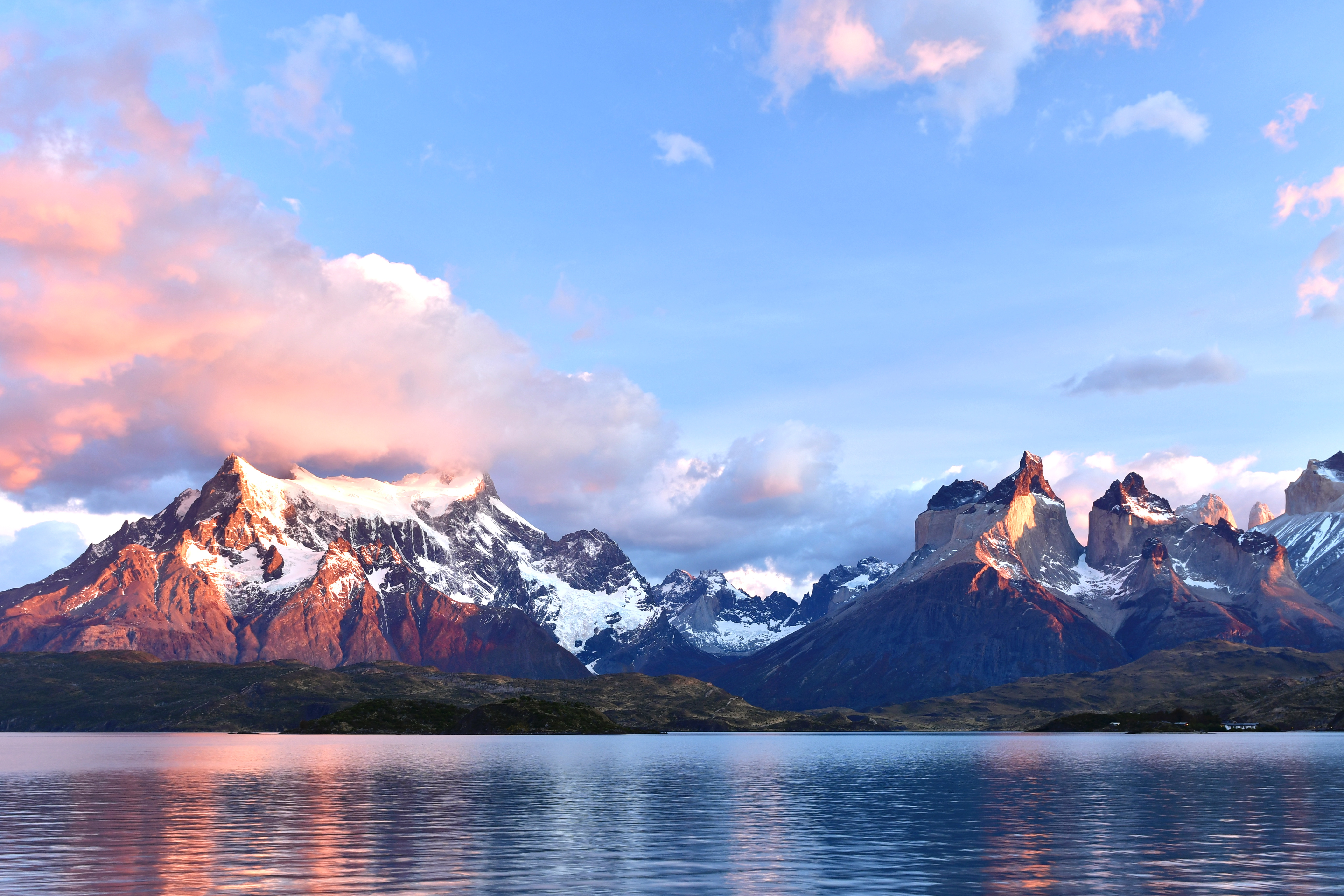 primeros rayos de sol en lago Pehoé